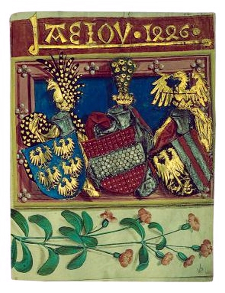 AEIOU, Buchmalerei in der Handregistratur König Friedrichs IV. (des späteren Kaisers Friedrich III.), 1446